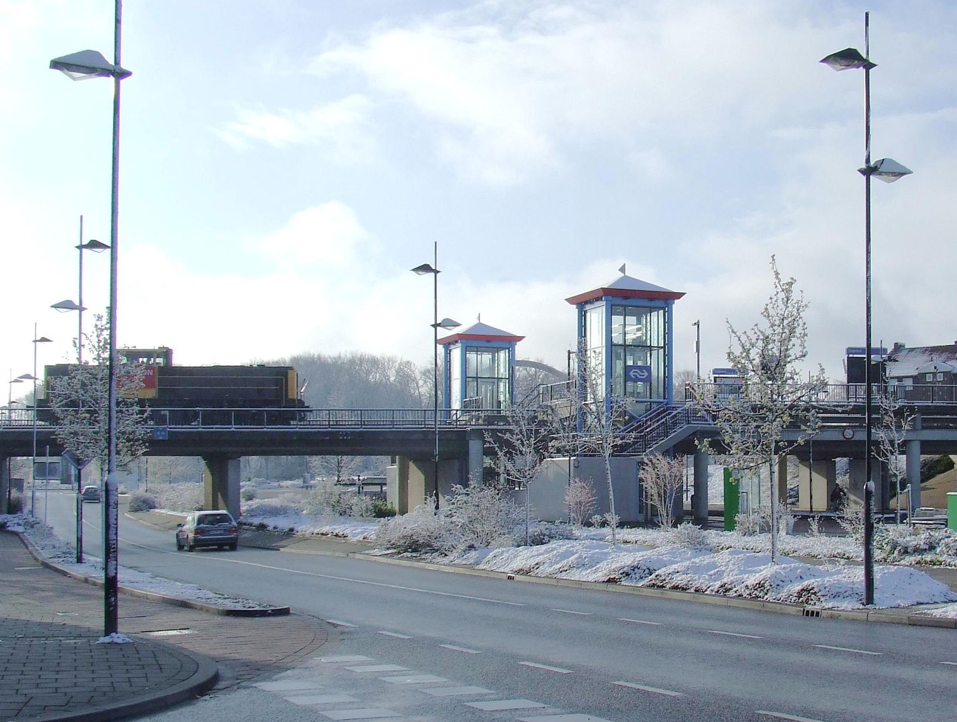 Foto Station Tegelen